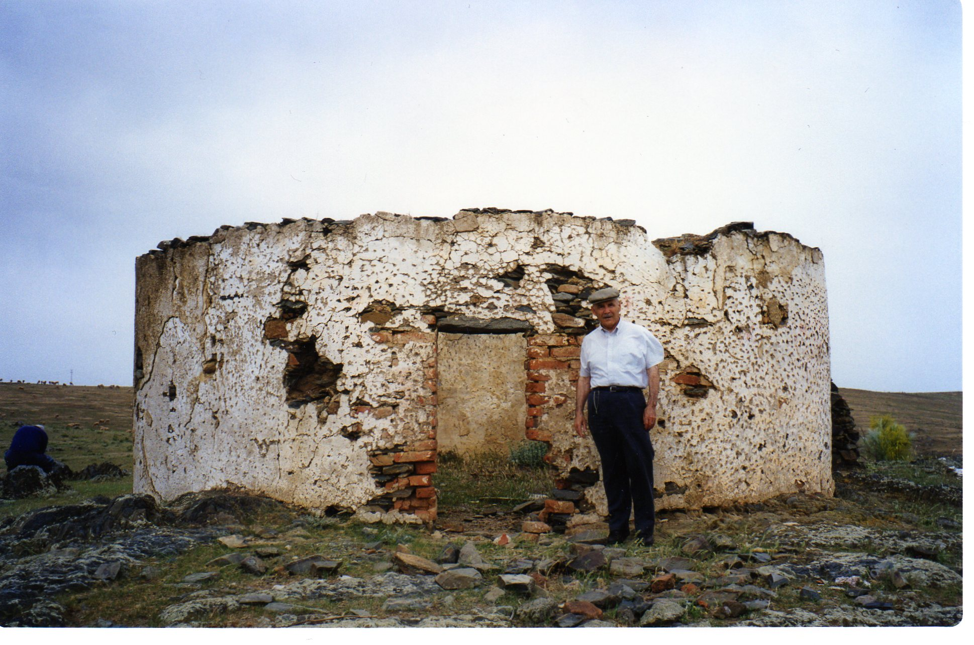 Delante de los restos del chozo de la Sevillana